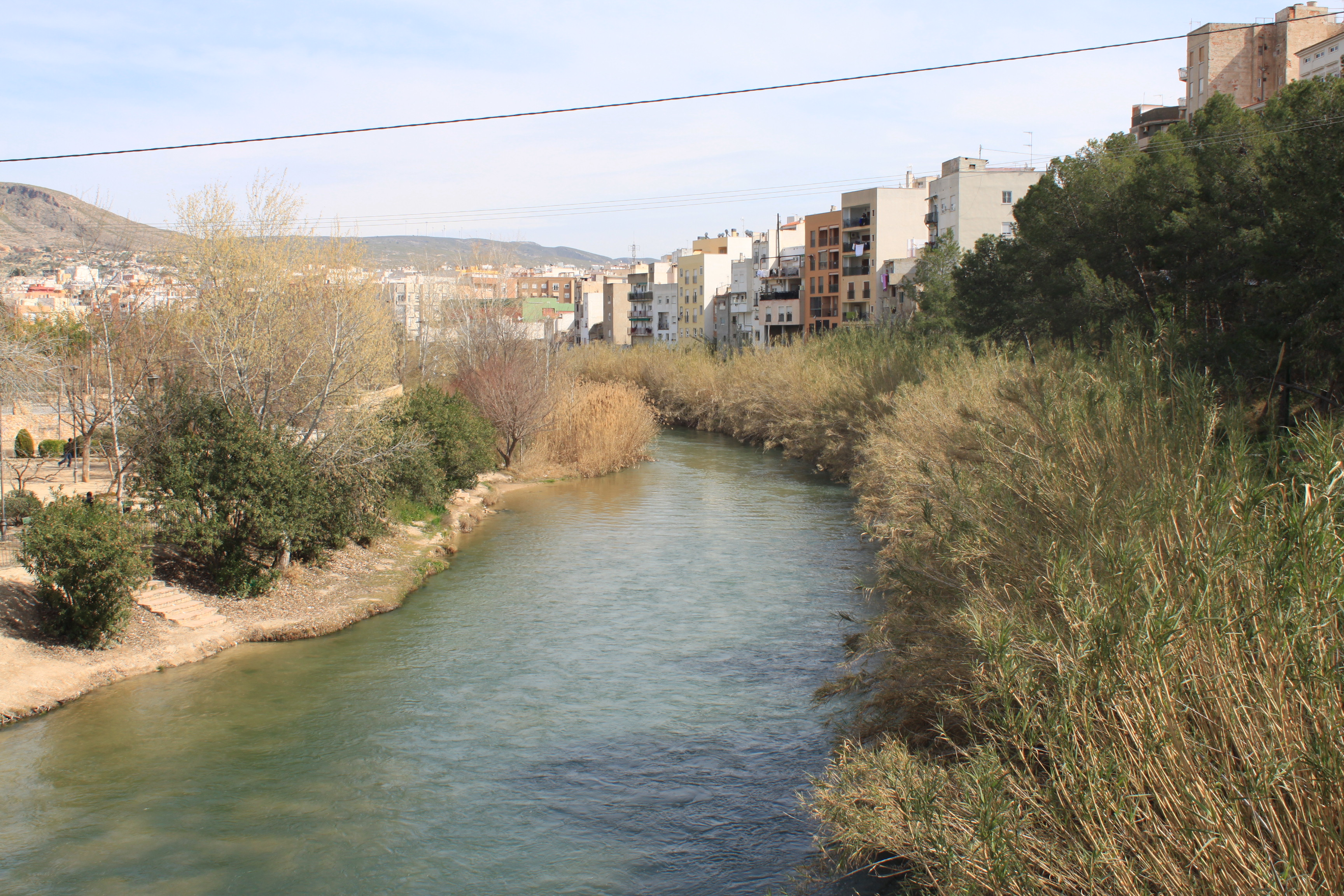 Imagen del río Segura a su paso por la ciudad de Cieza (Región de Murcia, España).